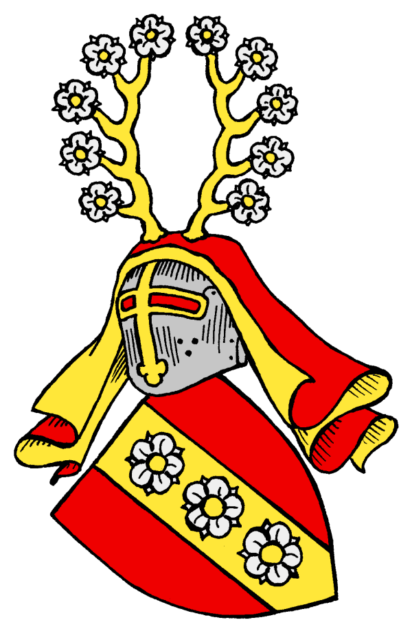 Wappen derer von Buchegg 2